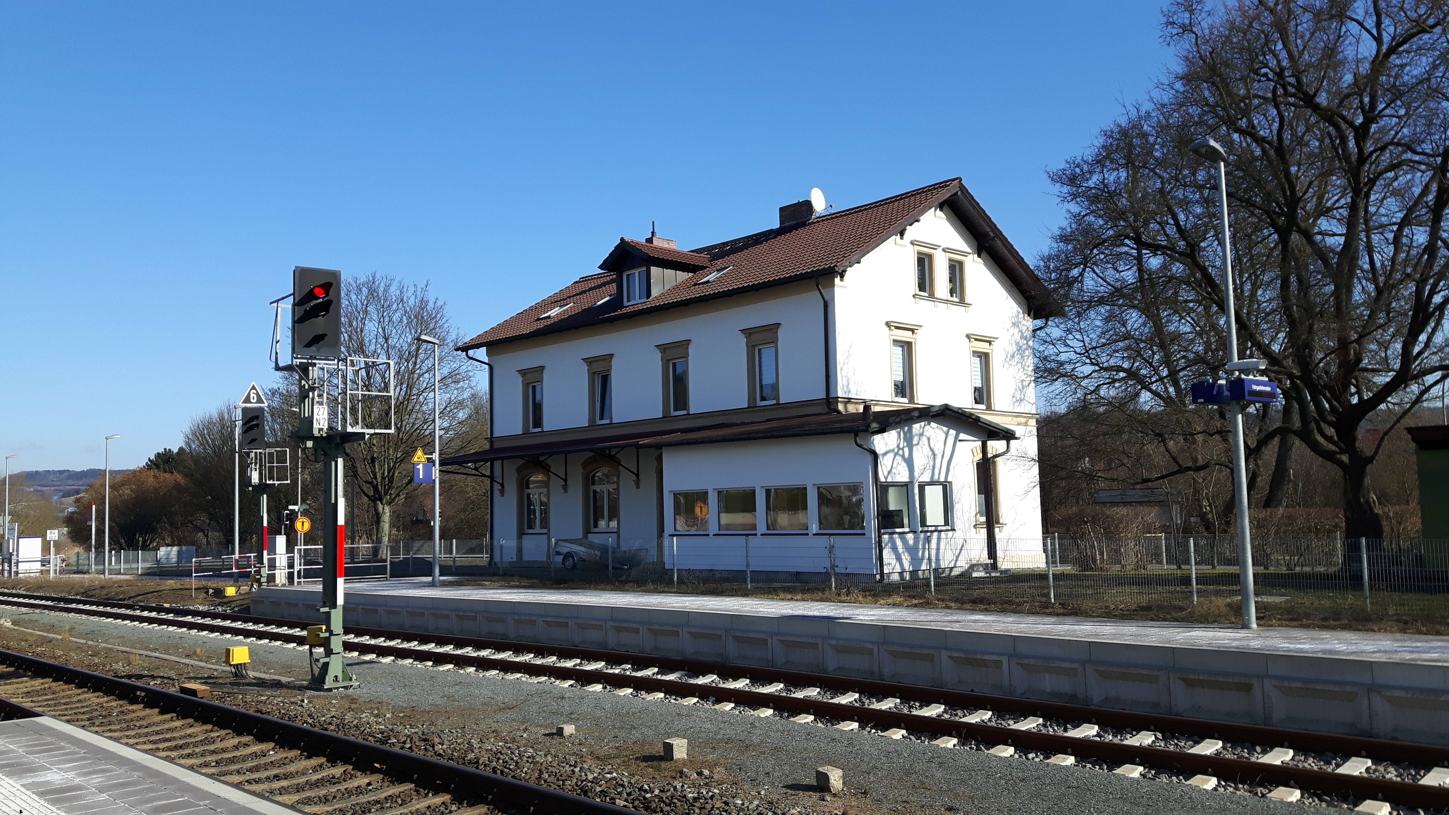 Bahnhof in Bindlach, 2018